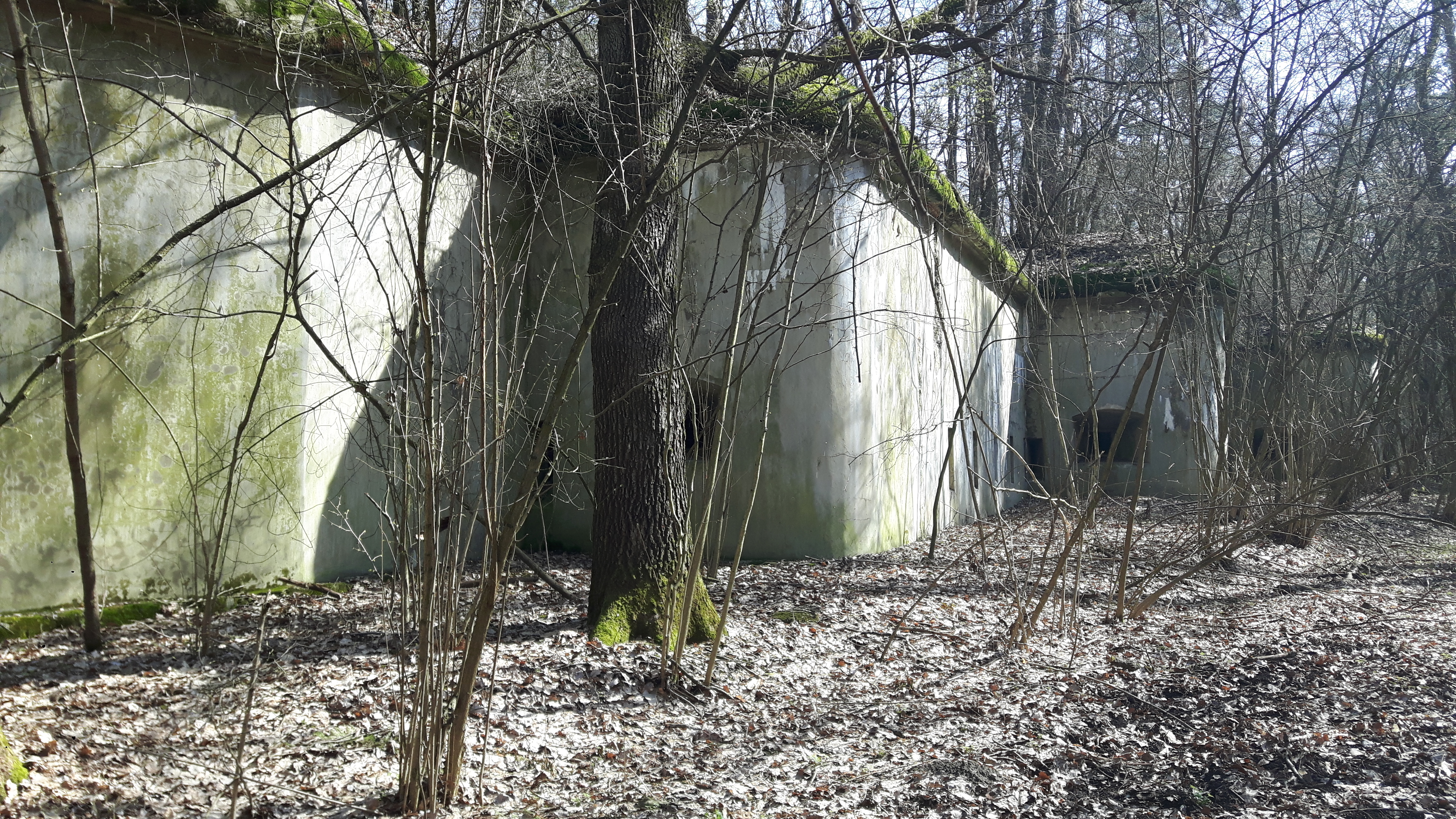 Tradytor artyleryjski - widok od zachodu